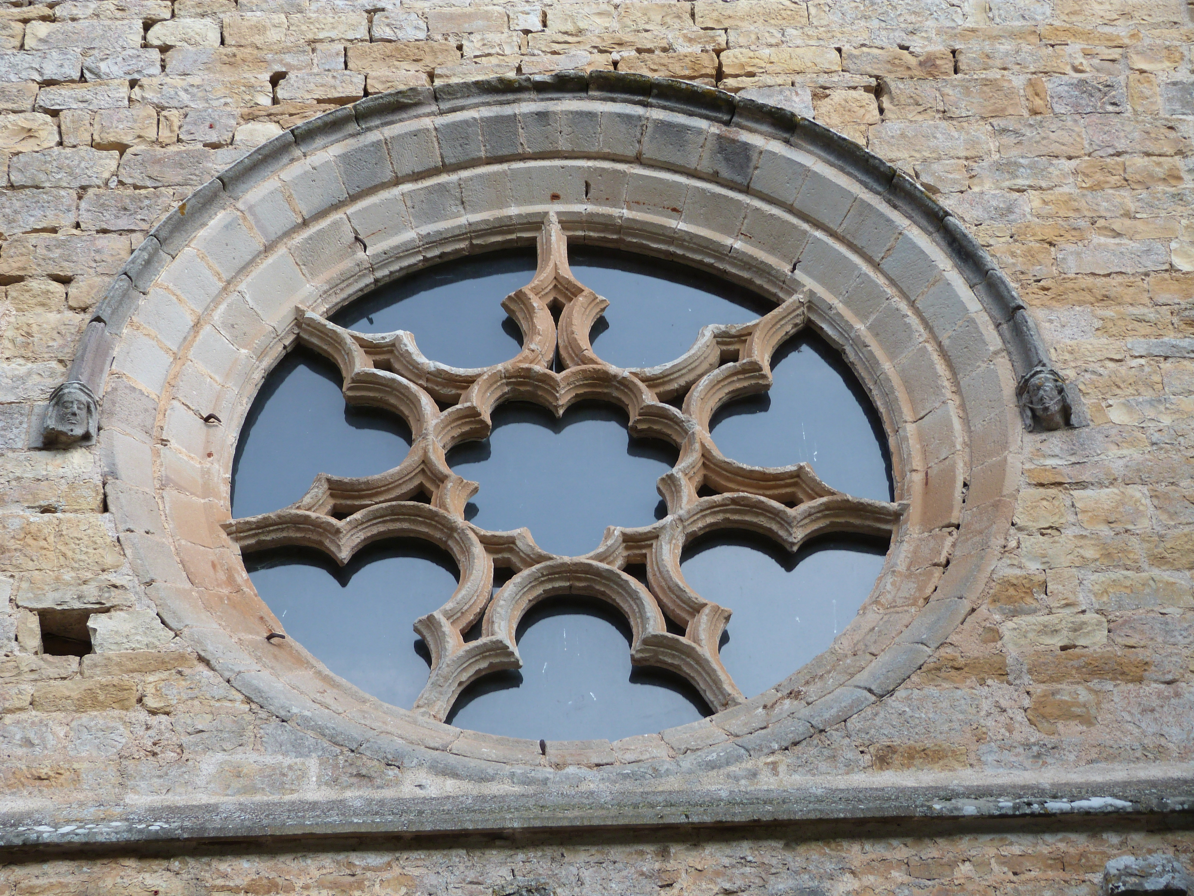 Abbaye de Beaulieu (ClasséClasséInscrit) .